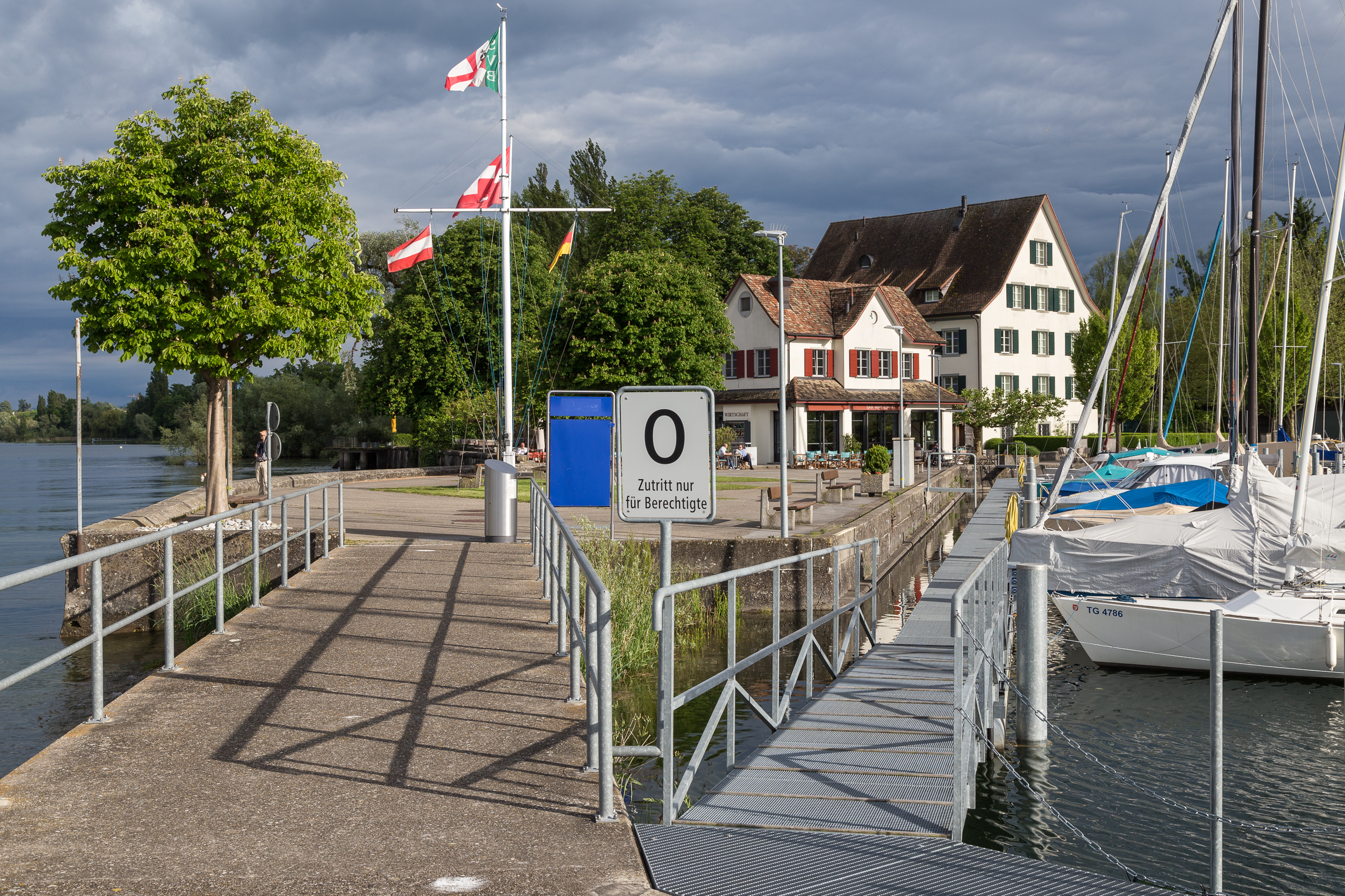 Bottighofen: Bootshafen mit Wirtschaft und Wohnhaus Schlössli